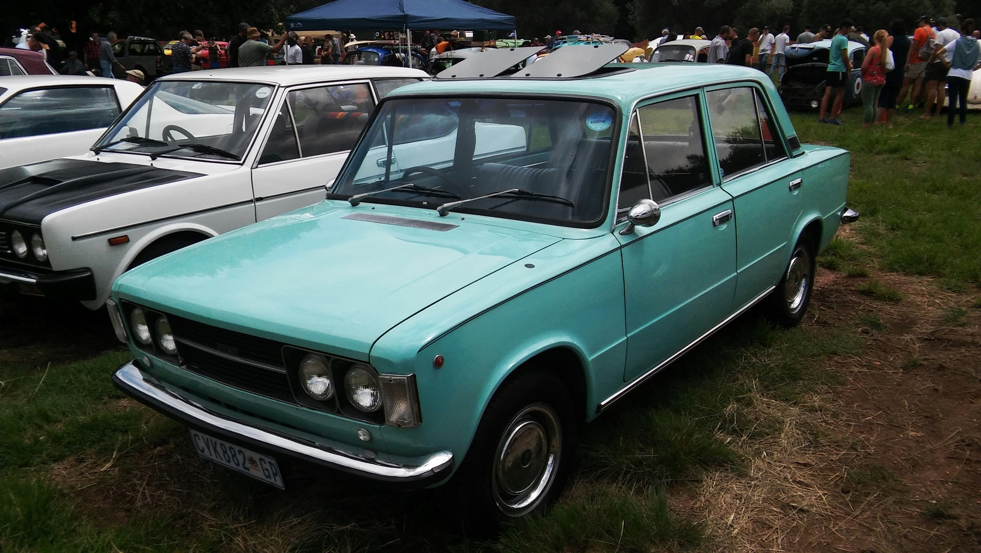 Fiat 1966-74 124 Special-T. 2